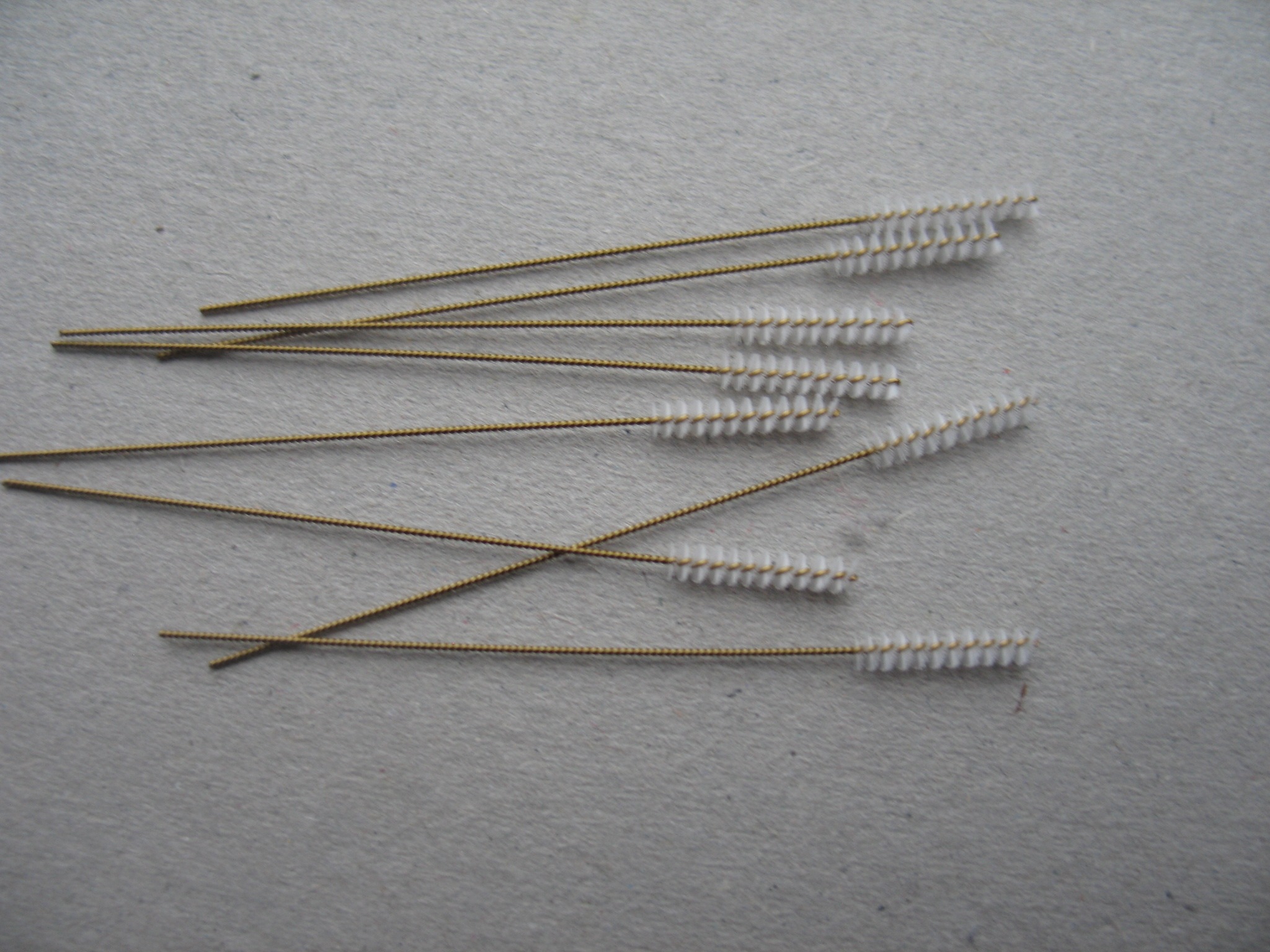 Raggertjes voor het schoonmaken van de beugel